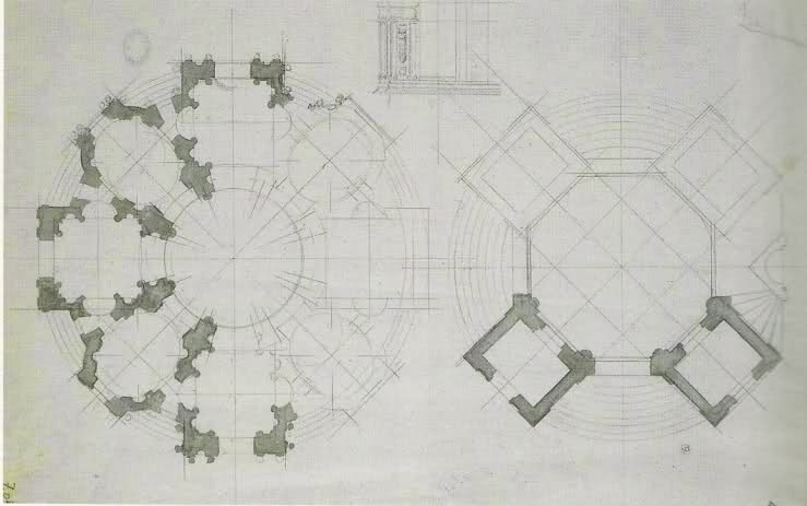 Les deux projets du Bernin pour la chapelle des Bourbons à Saint-Denis.